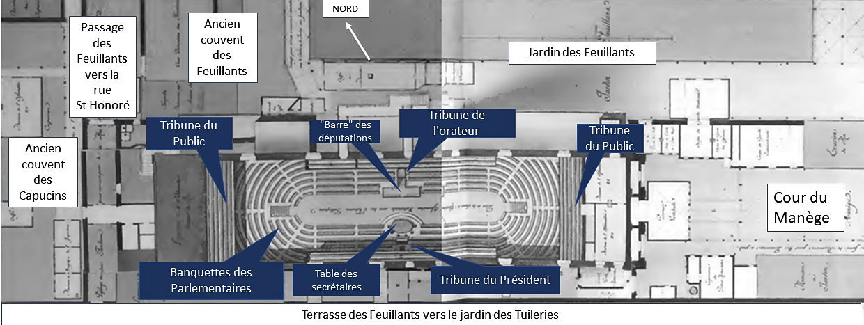 Plan de la Salle du Manège des Tuileries dressé en 1789 et portant des annotations permettant de localiser les principaux emplacements de l'assemblée parlementaire